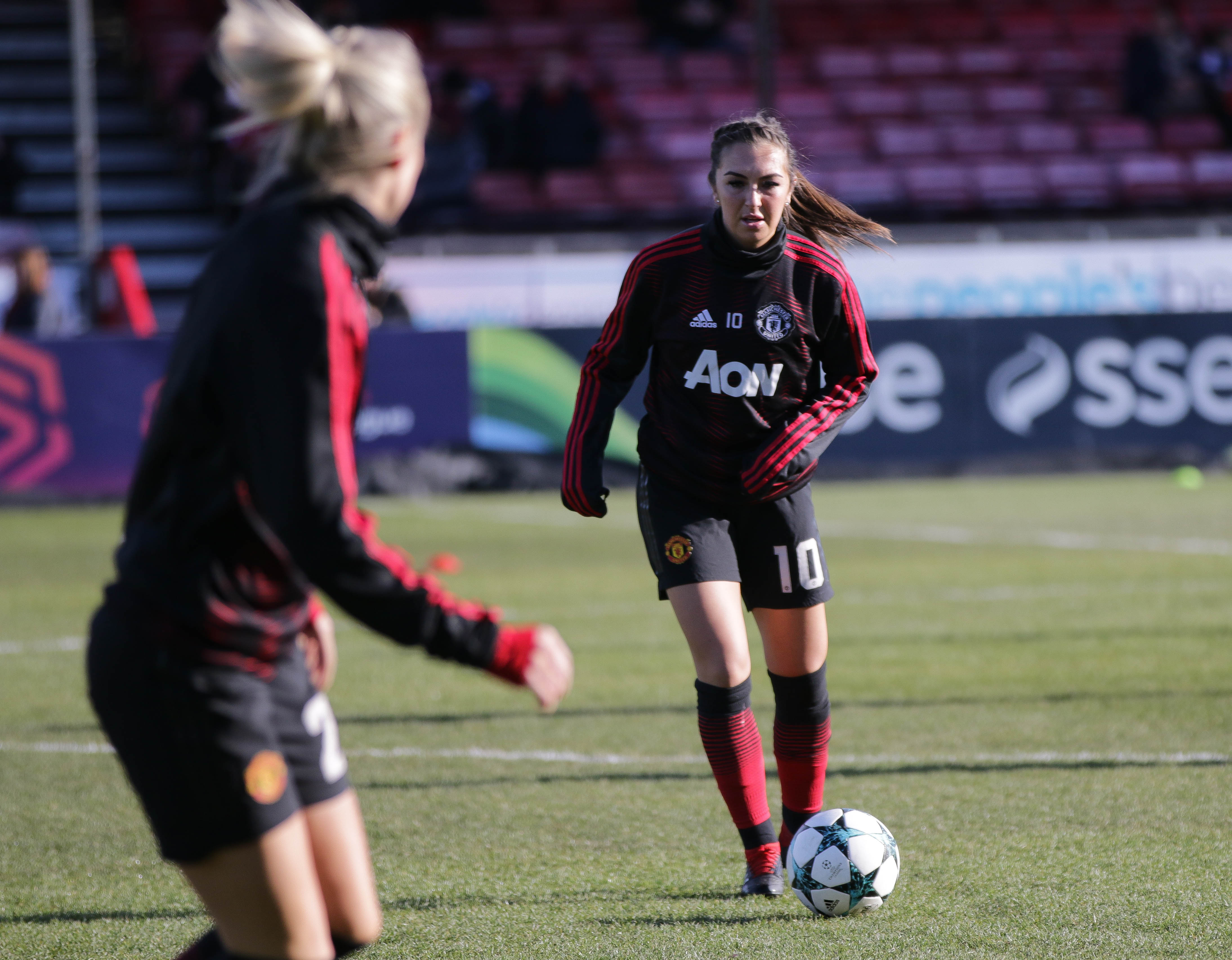 Katie Zelem